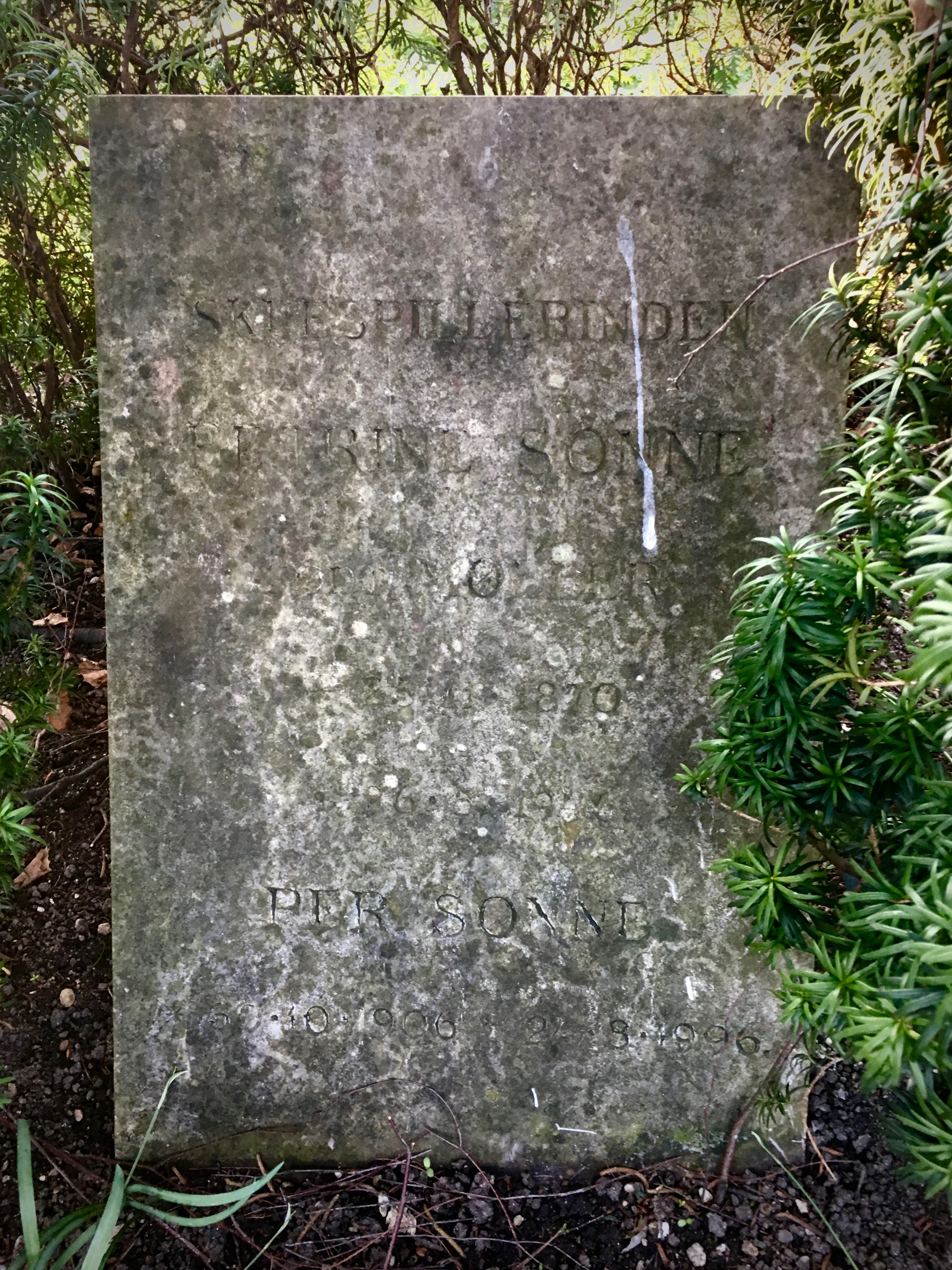 Skuespillerinden Petrine Sonne- og hendes søn Per Sonnes gravsten, Assistens Kirkegård